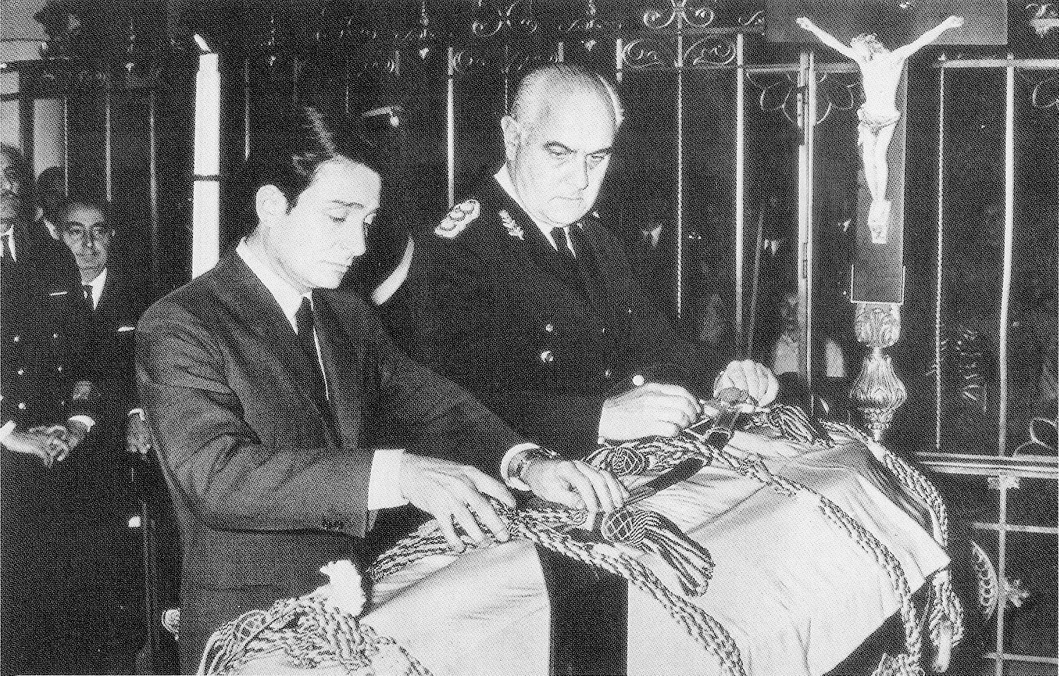 El féretro del ex presidente de la Argentina Pedro Eugenio Aramburu, asesinado por la organización guerrillera Montoneros en julio de 1970. Junto a él, el general Alejandro Lanusse y el hijo de Aramburu.